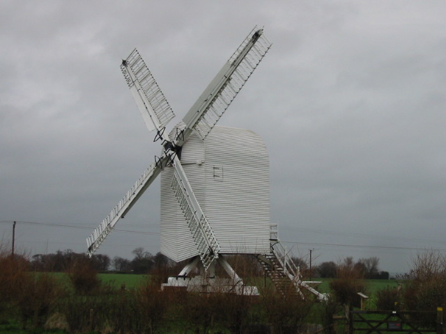 Chillenden Post Mill